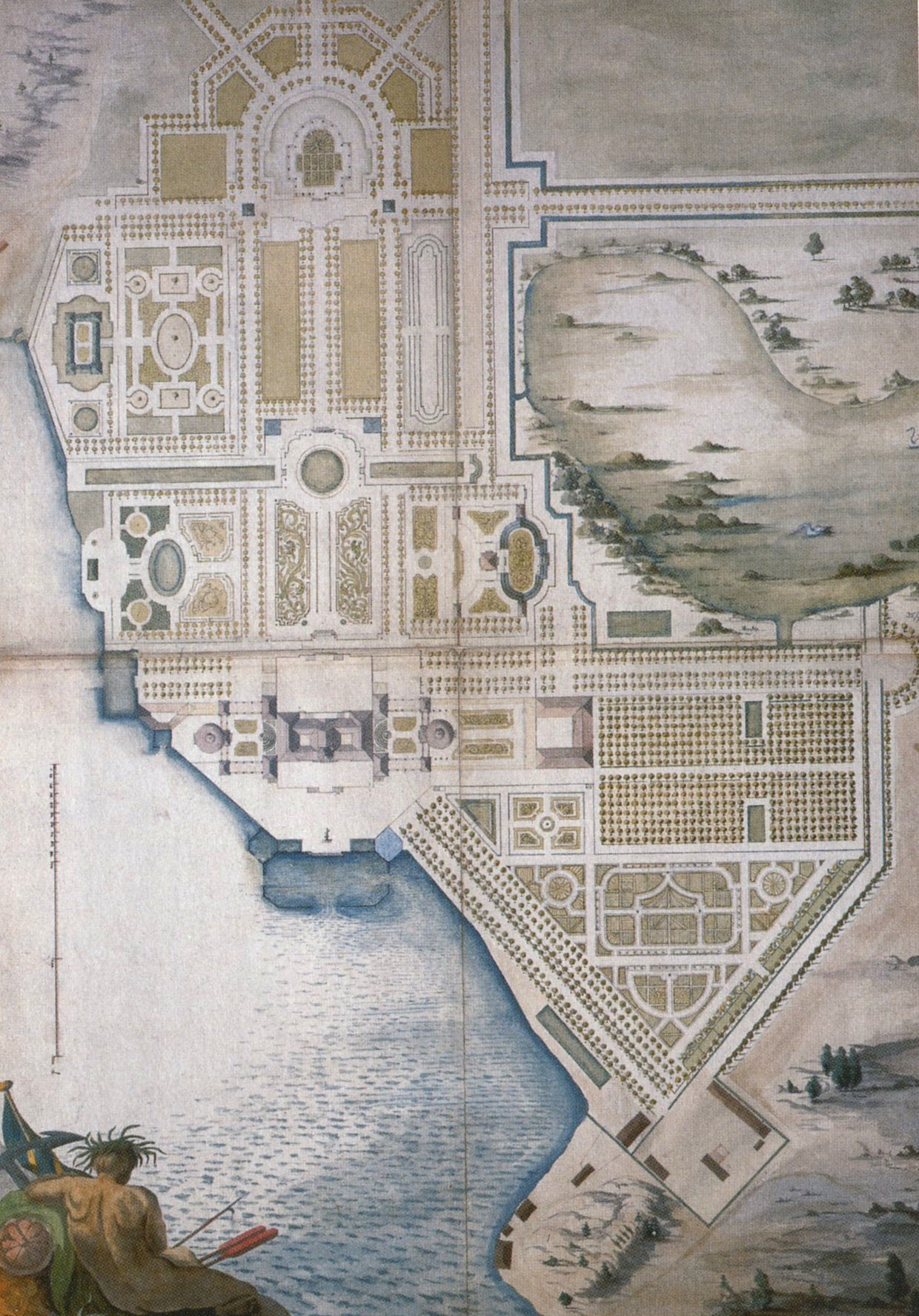 Förslag till barockpark vid Drottningholms slott, norr är till höger